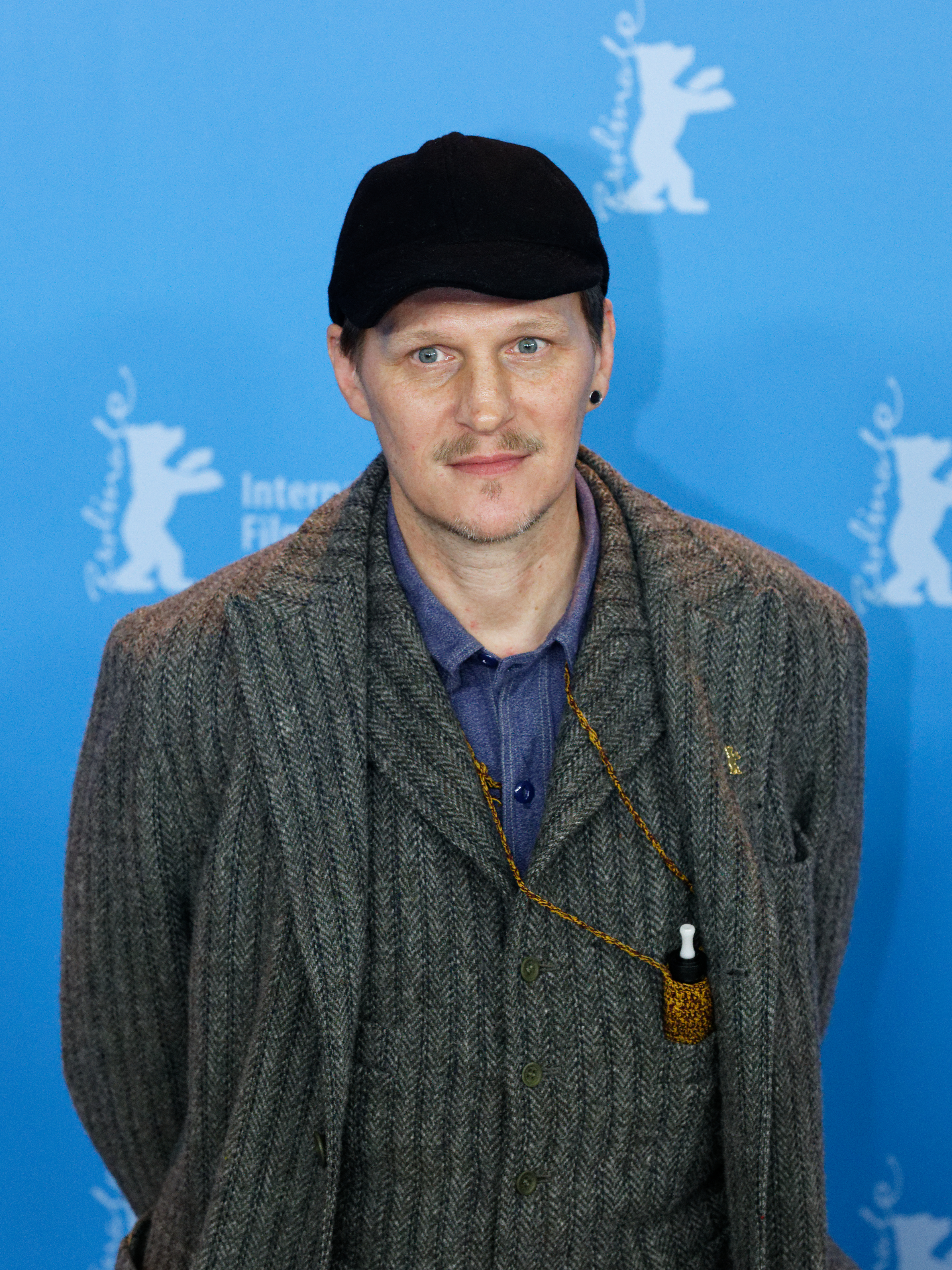 Georg Friedrich beim Photo Call zu Wilde Maus bei der Berlinale 2017